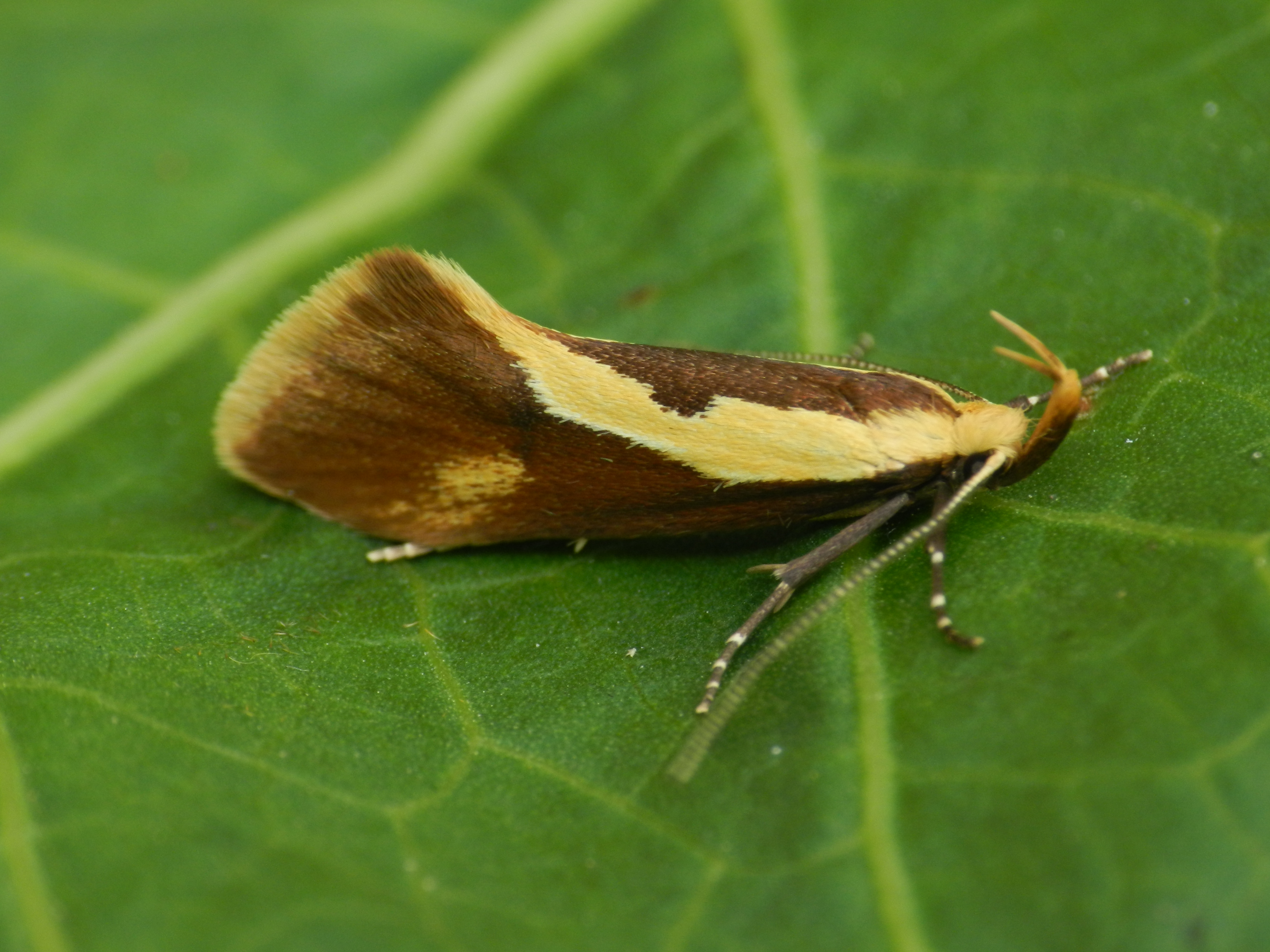 Harpella forficella. Picture taken in Olsztyn, Poland.